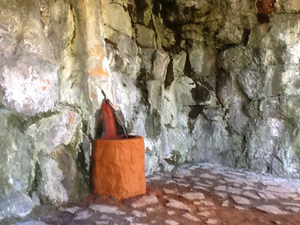 Rudolf-Pramen Kyselka 2014